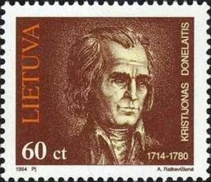 Vincas Mykolaitis-Putinas